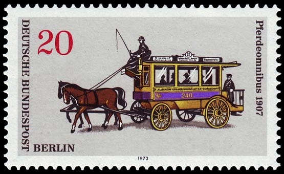 Omnibus, Berlin 1907